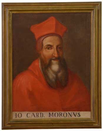 Il cardinale Giovanni Morone, o/t, 65 x 50 cm, Università di Bologna